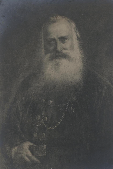 Carlos Rath - foto